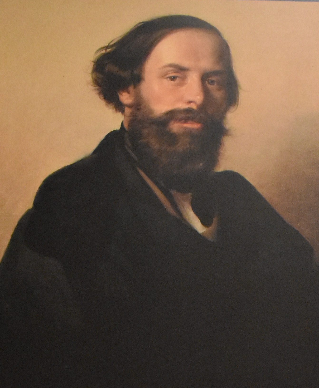 Ippolito Caffi, Autoritratto, 1840 ca., collezione Intesa San Paolo